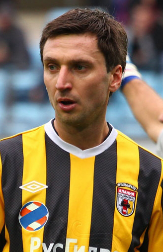 Дейвидас Шемберас